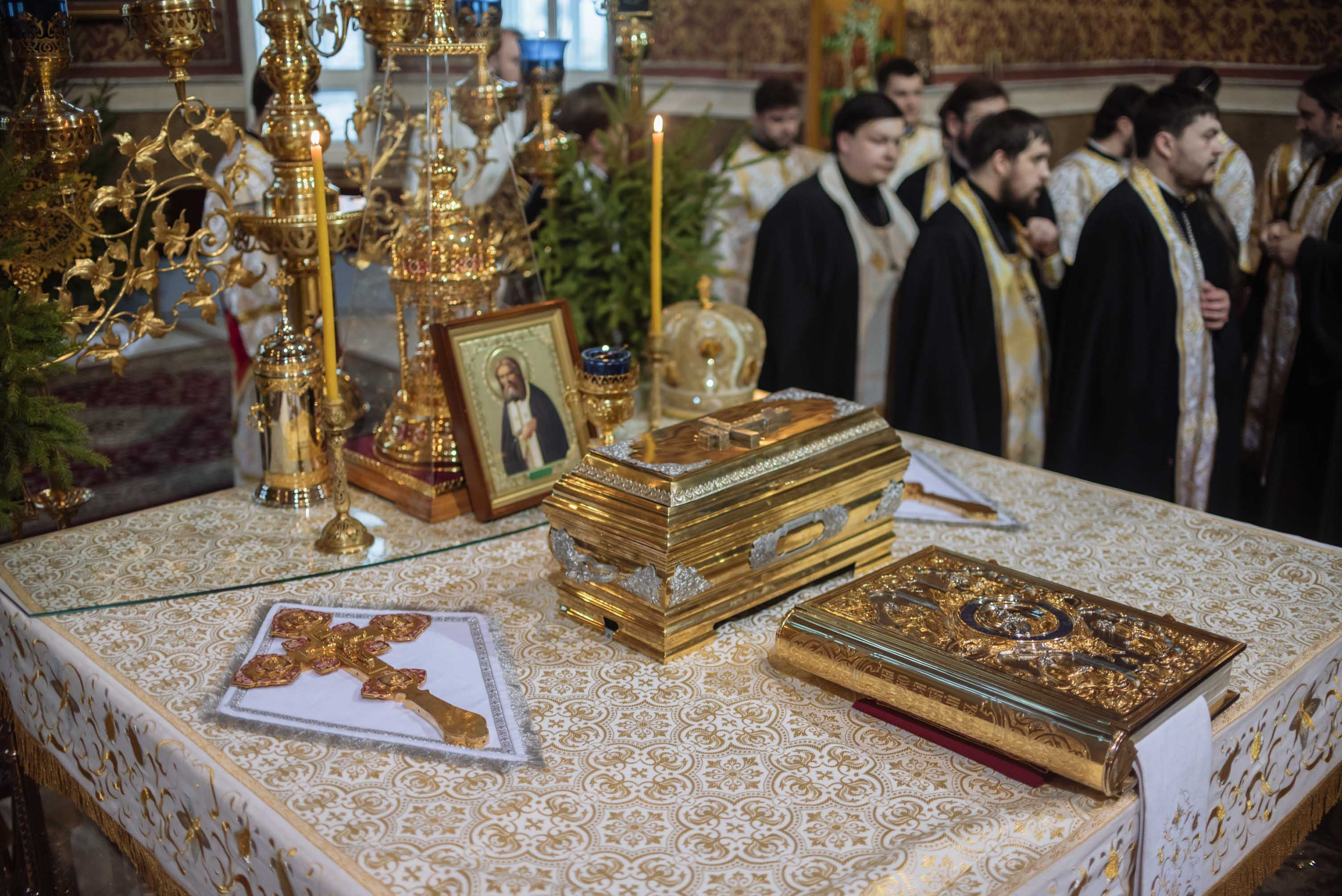 Успенский собор Астаны фото5